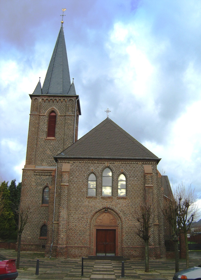 Eschweiler-Sankt Jöris: Kirche St. Georgius